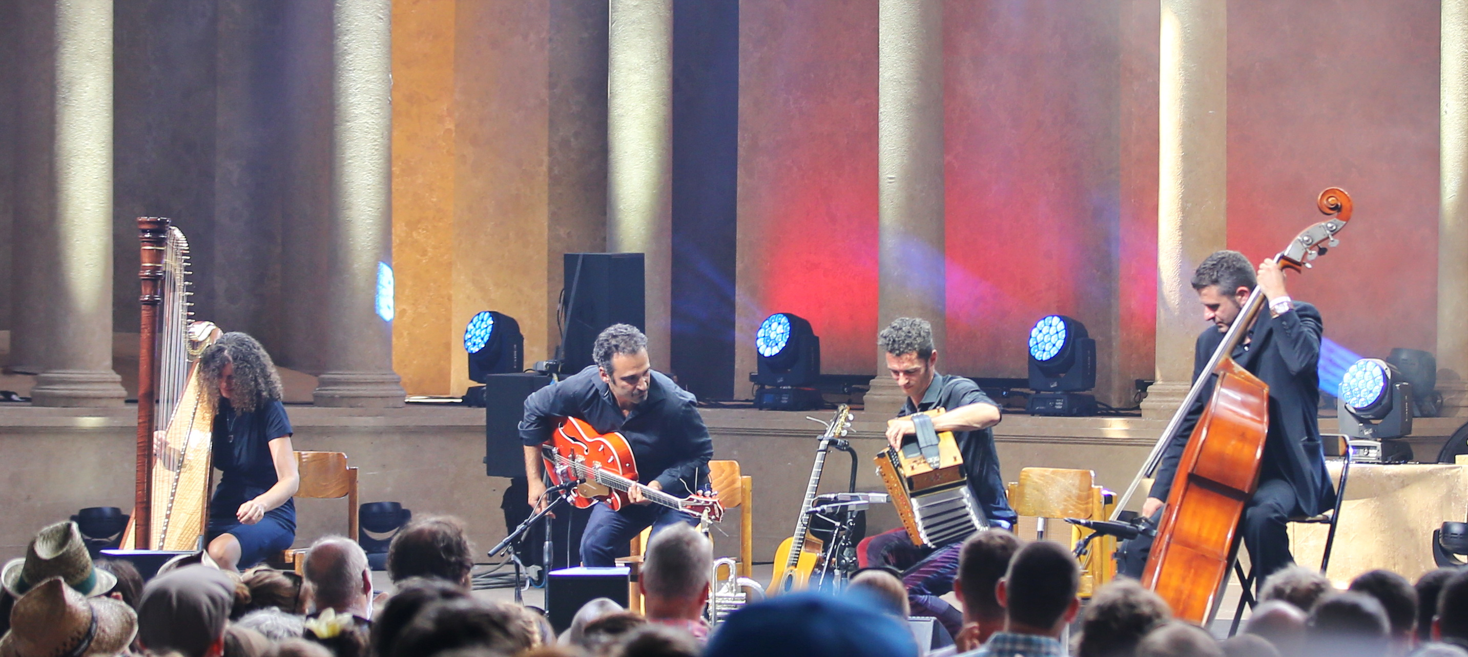 Herbert Pixner Projekt auf dem Heimatsound Festival 2016, im Bild: Heidi Pixner, Manuel Randi, Herbert Pixner und Werner Unterlercher. Festivalsommer This photo was created with the support of donations to Wikimedia Deutschland in the context of the CPB project "Festival Summer". This file is made available under the Creative Commons CC0 1.0 Universal Public Domain Dedication. The person who associated a work with this deed has dedicated the work to the public domain by waiving all of their rights to the work worldwide under copyright law, including all related and neighboring rights, to the extent allowed by law. You can copy, modify, distribute and perform the work, even for commercial purposes, all without asking permission. Thomas Springer Personality rights warningAlthough this work is freely licensed or in the public domain, the person(s) shown may have rights that legally restrict certain re-uses unless those depicted consent to such uses. In these cases, a model release or other evidence of consent could protect you from infringement claims.